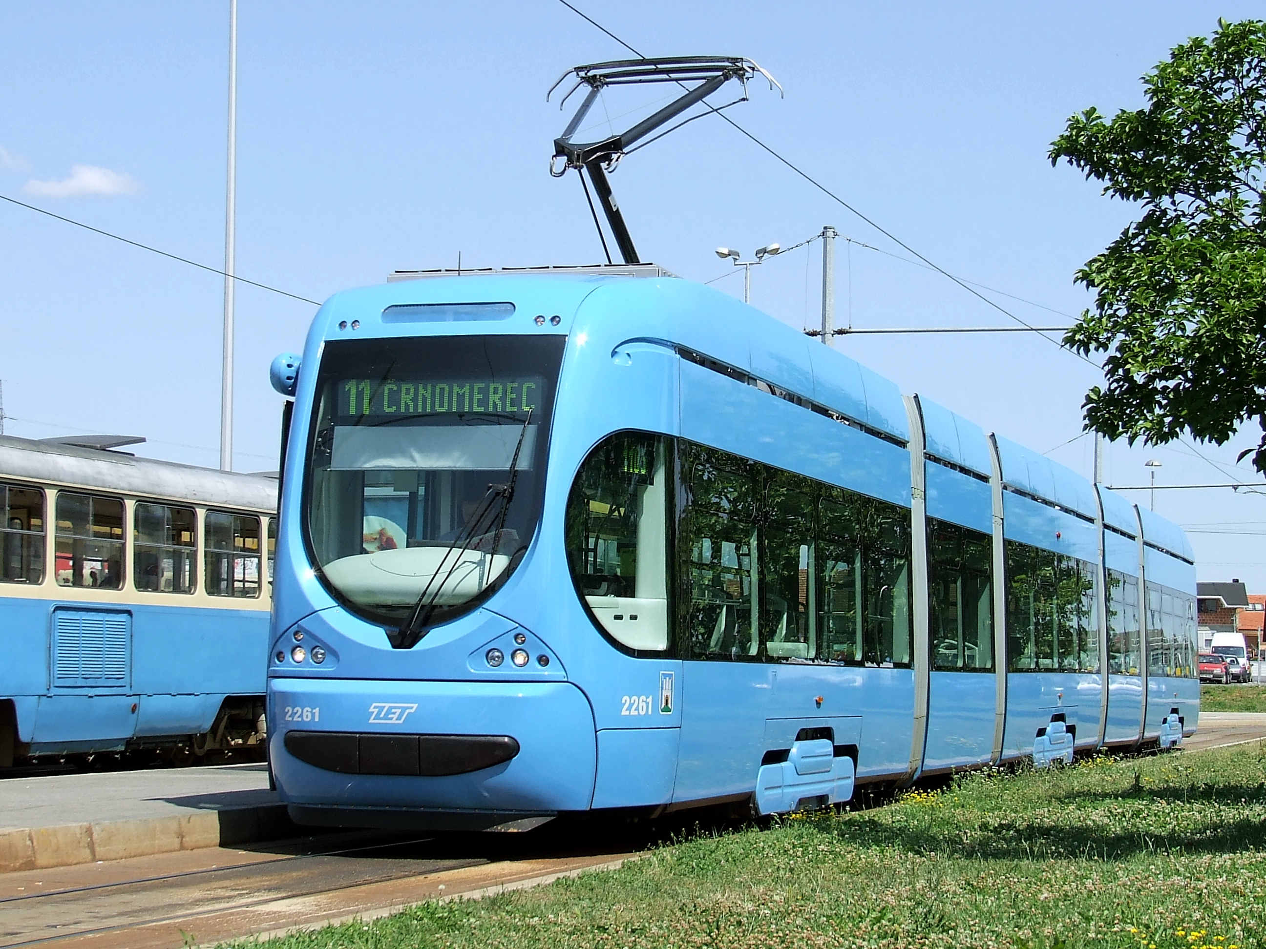 A horvát Crotram konzorcium TMK 2200-as típusú villamosa Zágrábban (Horvátország)